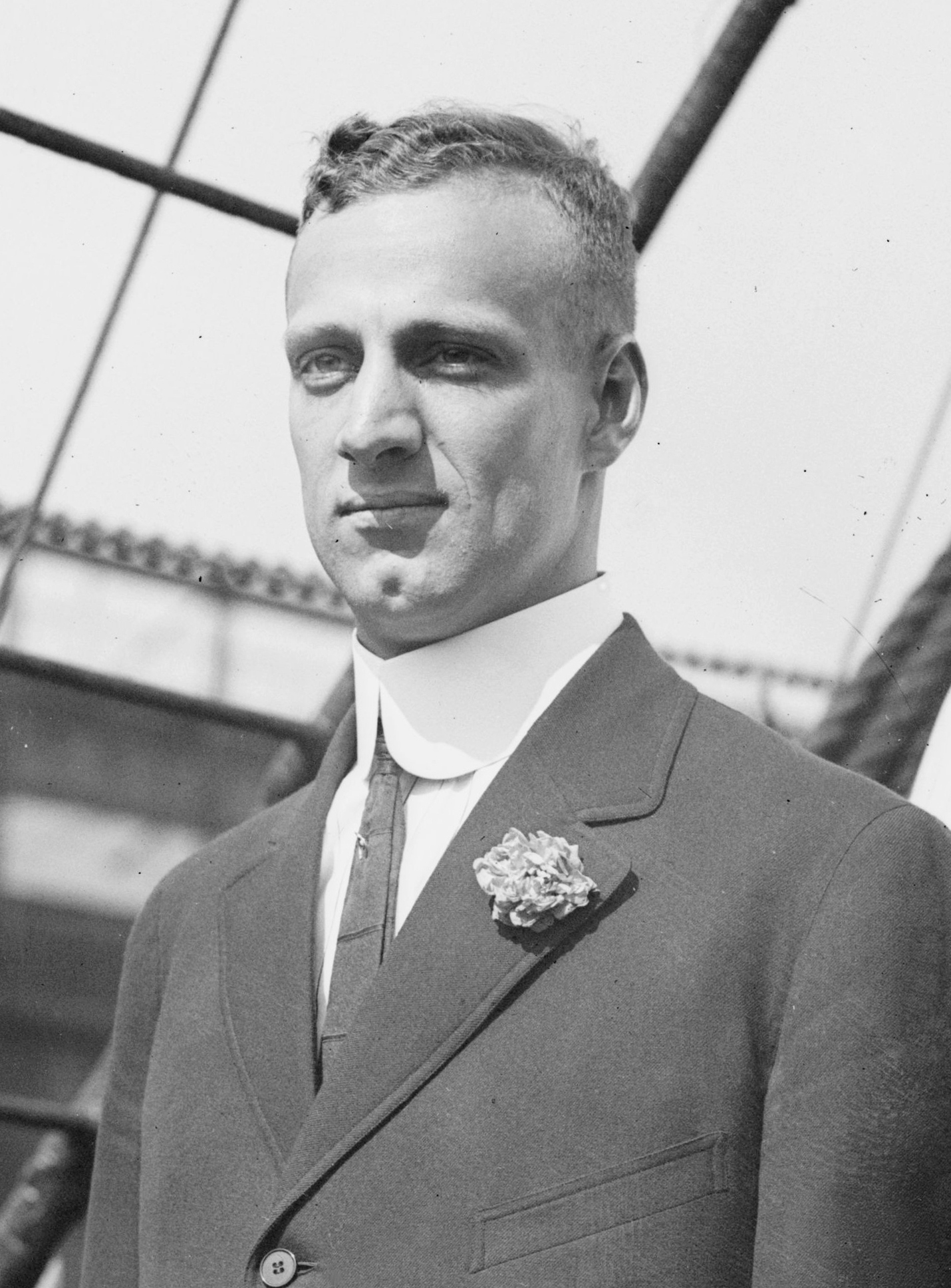 Benjamin Adams (athlete)